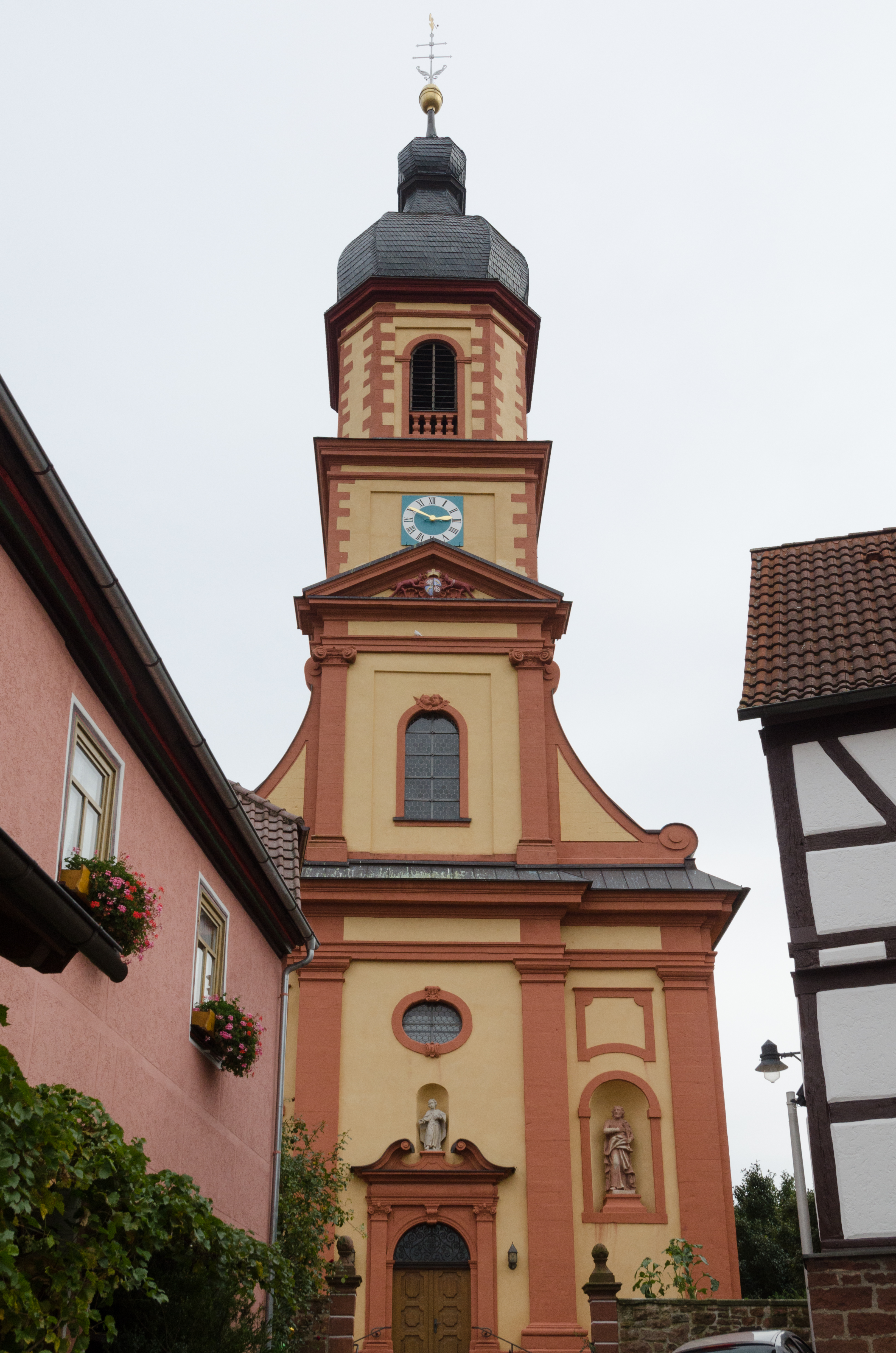 Mönchberg, Katholische Pfarrkirche St. Johann Baptist